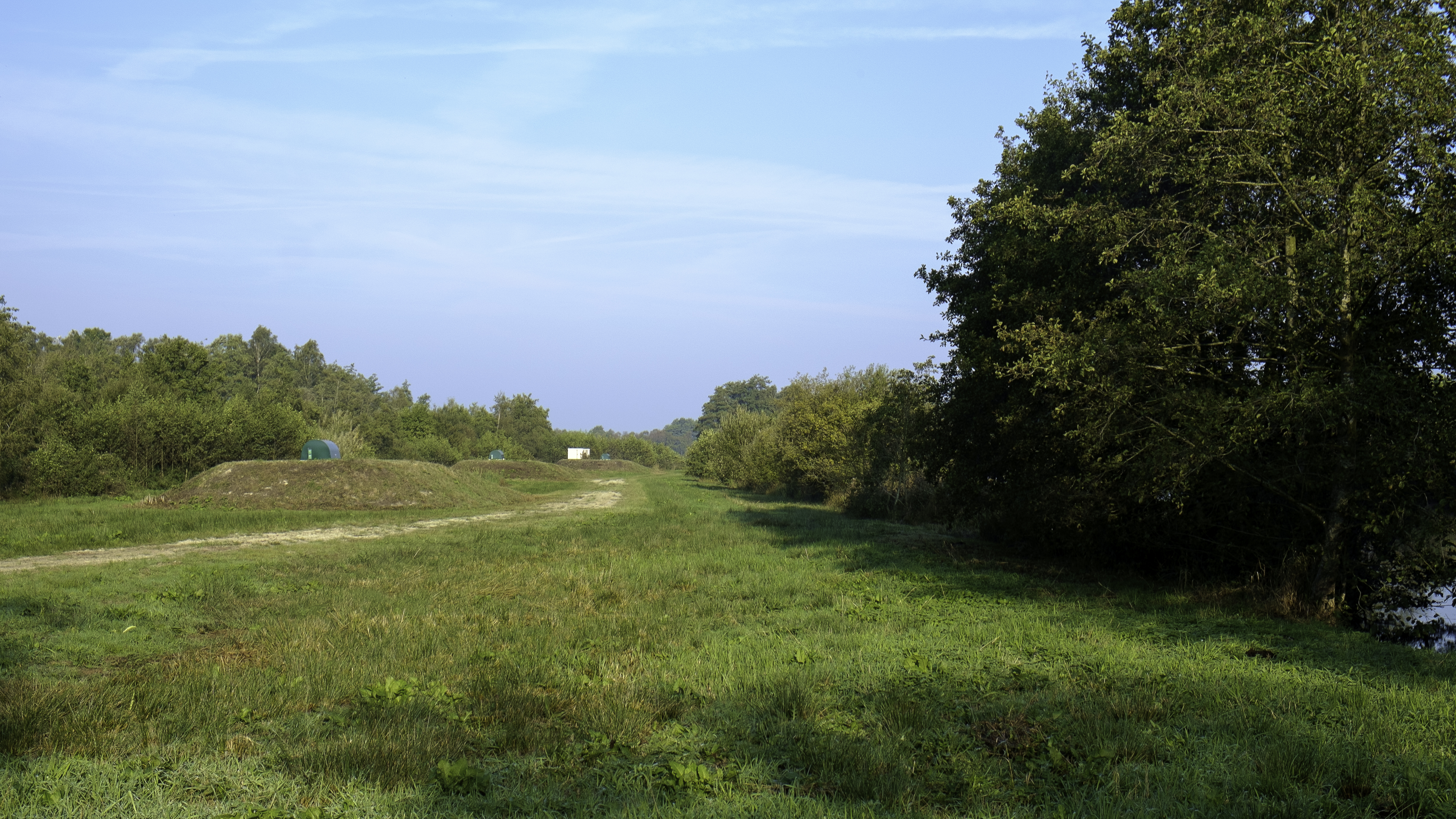 Waterwinputten in de Noordlaarder Oostpolder